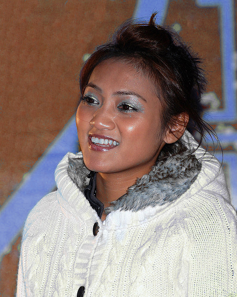 星光二班葉瑋庭